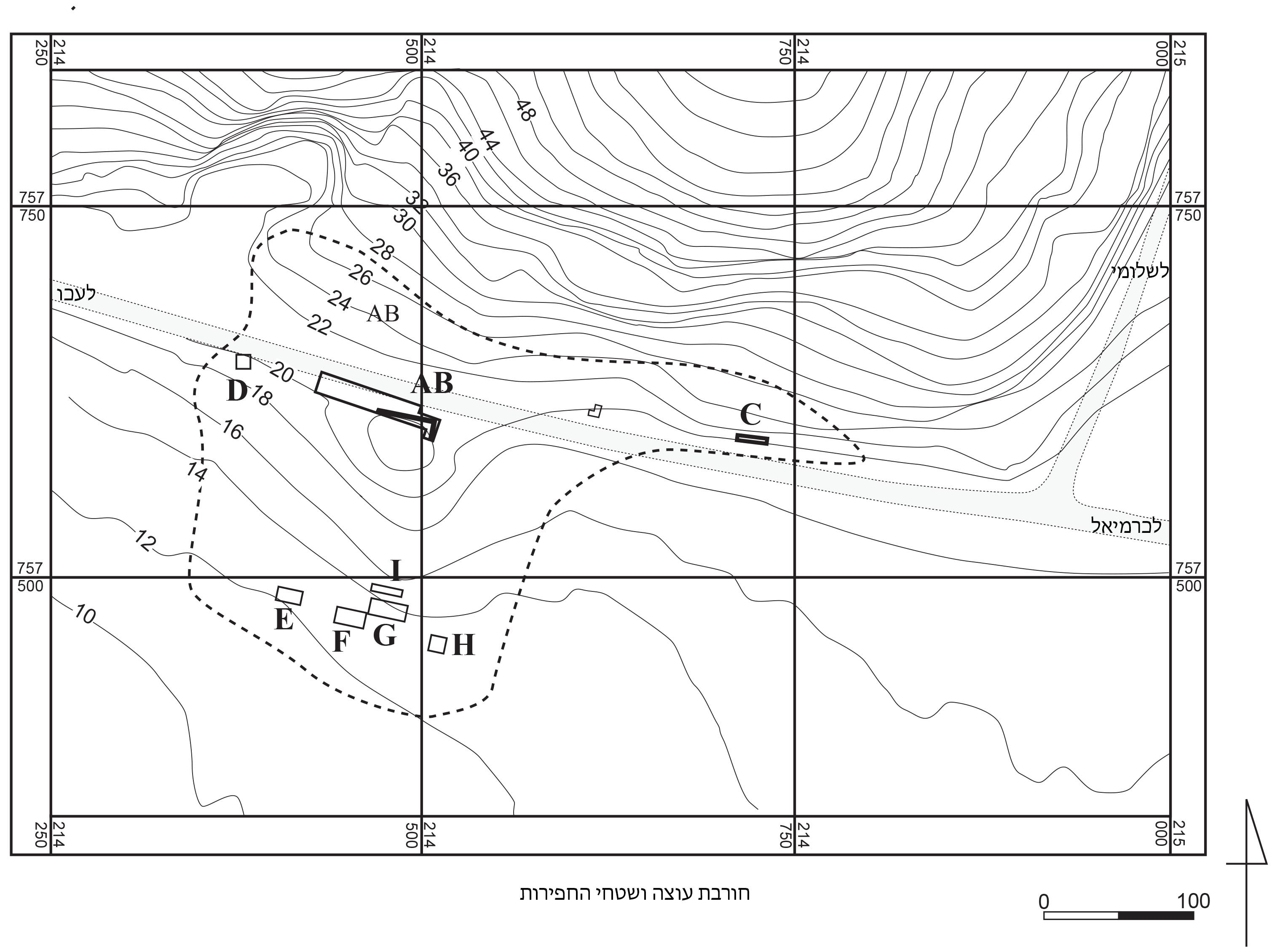 חורבת עוצה - מפת האתר וסימון שטחי החפירה במערב האתר בולט תל קטן ובמרכזו באר מים, שבעבר הקרוב שפעה במשך כל השנה